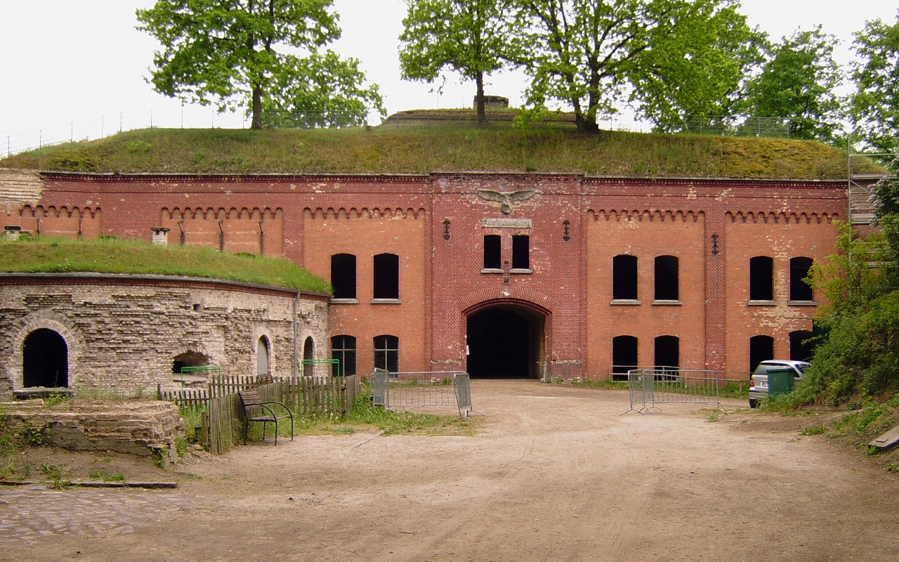 Spandau Fort Hahneberg Kehlkaserne